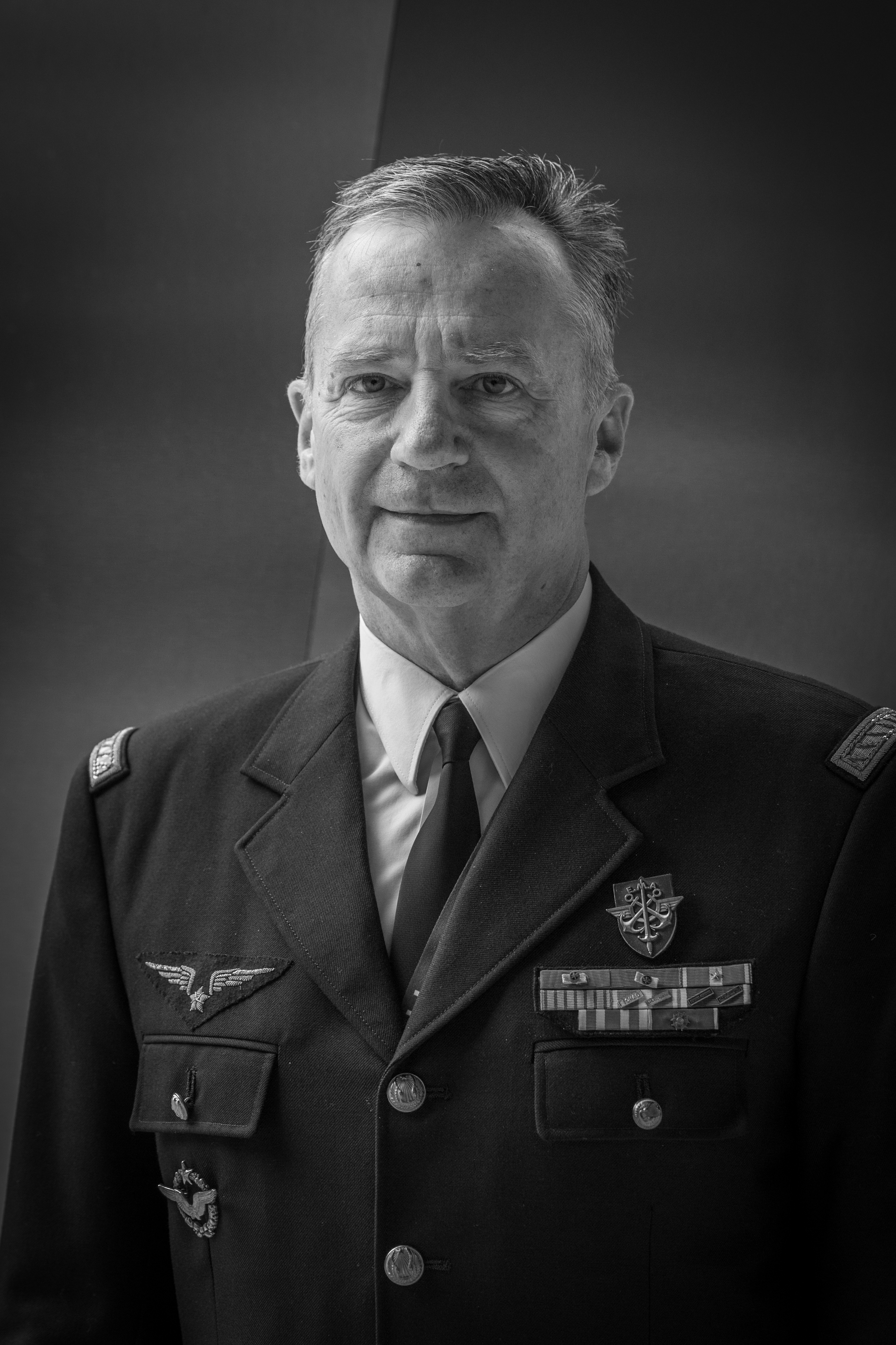 Gratien Maire par Claude Truong-Ngoc septembre 2015.jpg